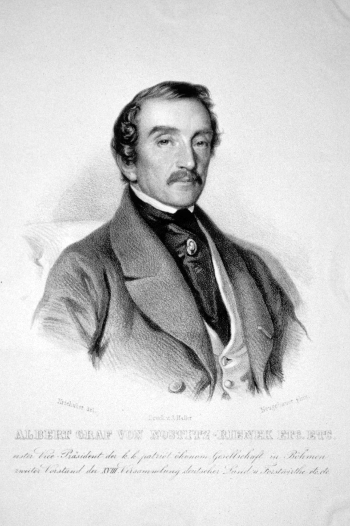 Albert Graf Nostitz-Rieneck (1807-1871), Oberstlandmarschall des Königreiches Böhmen. Lithographie von Josef Kriehuber. Nach einem Gemälde von Neugebauer.